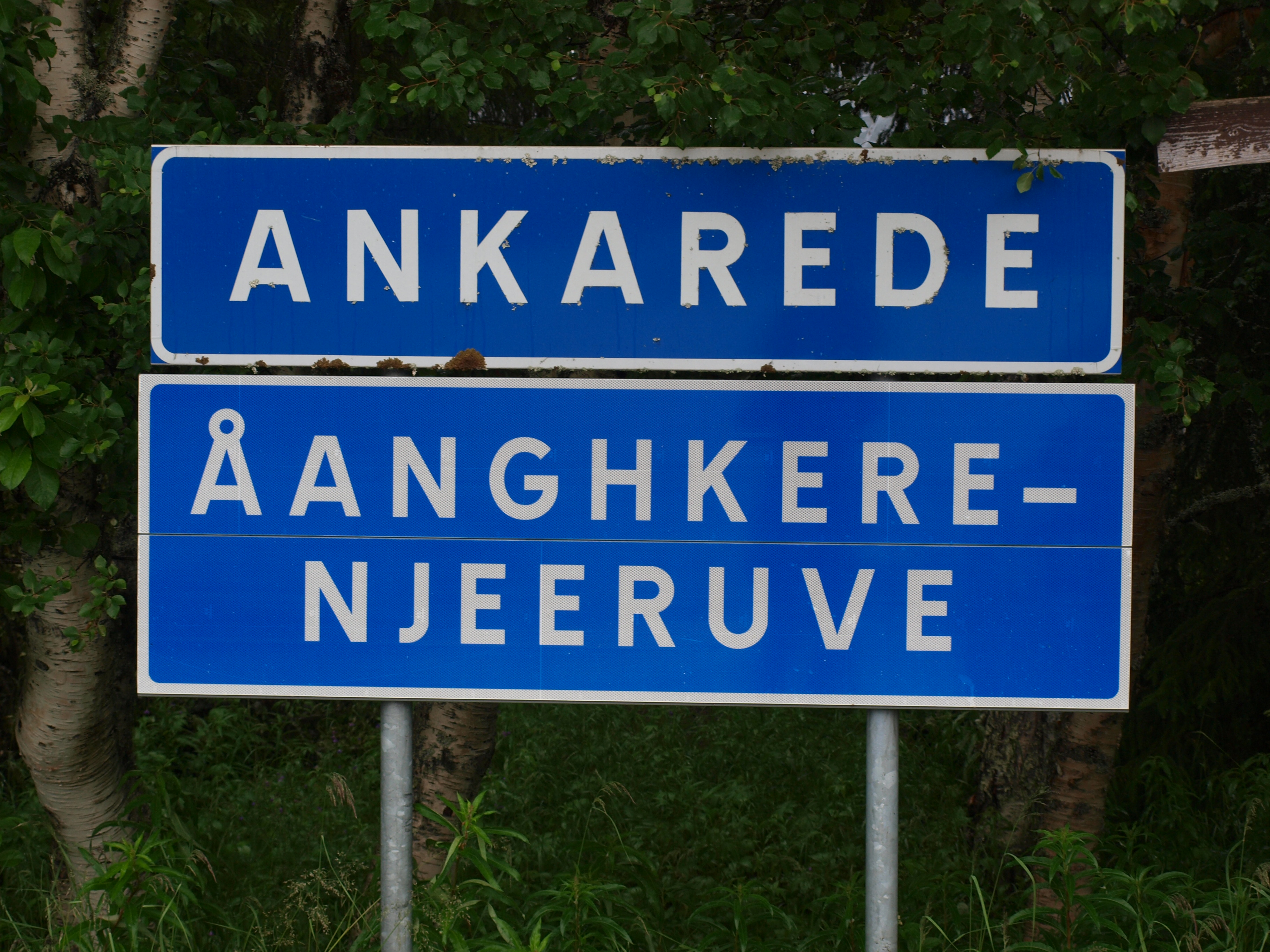 Ankarede/Åanghkerenjeeruve.